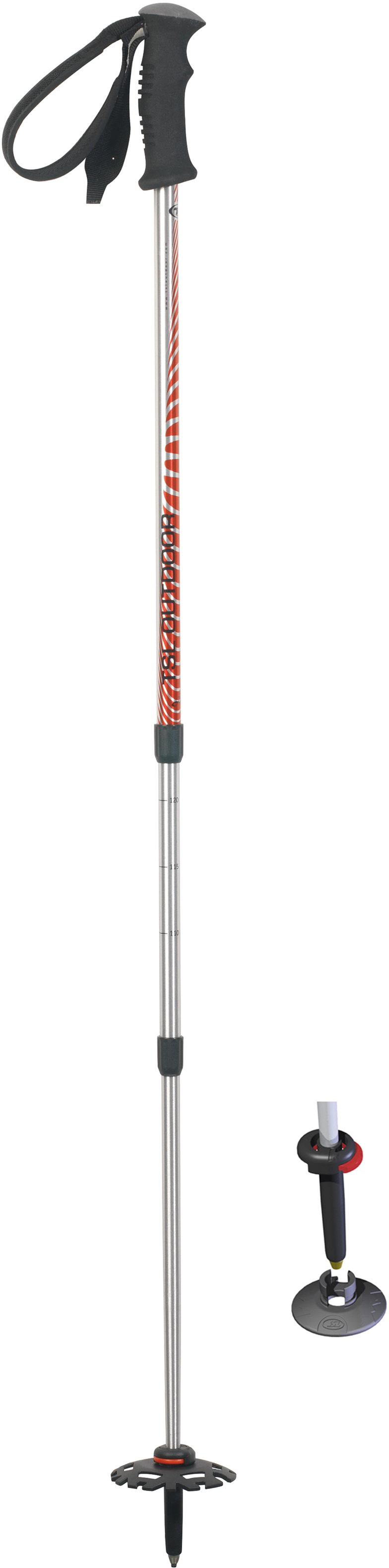 Bâton de randonnée TSL QUEYRAS